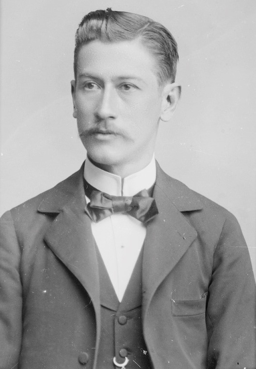 El epriodista liberal ecuatoriano Belisario Torres, por el fotógrafo quiteño Benjamín Rivadeneira Guerra (circa 1900).